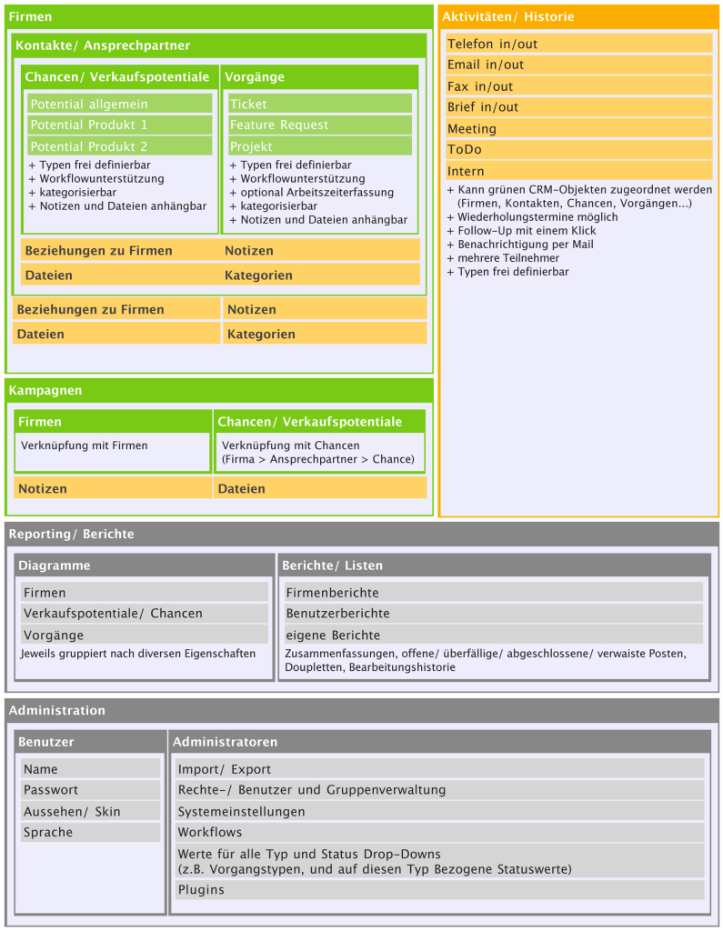 Struktur des Open Source CRM XRMS